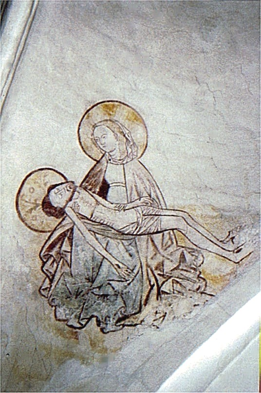 Lunde Kirke i Danmark. Sydkappe, Pieta